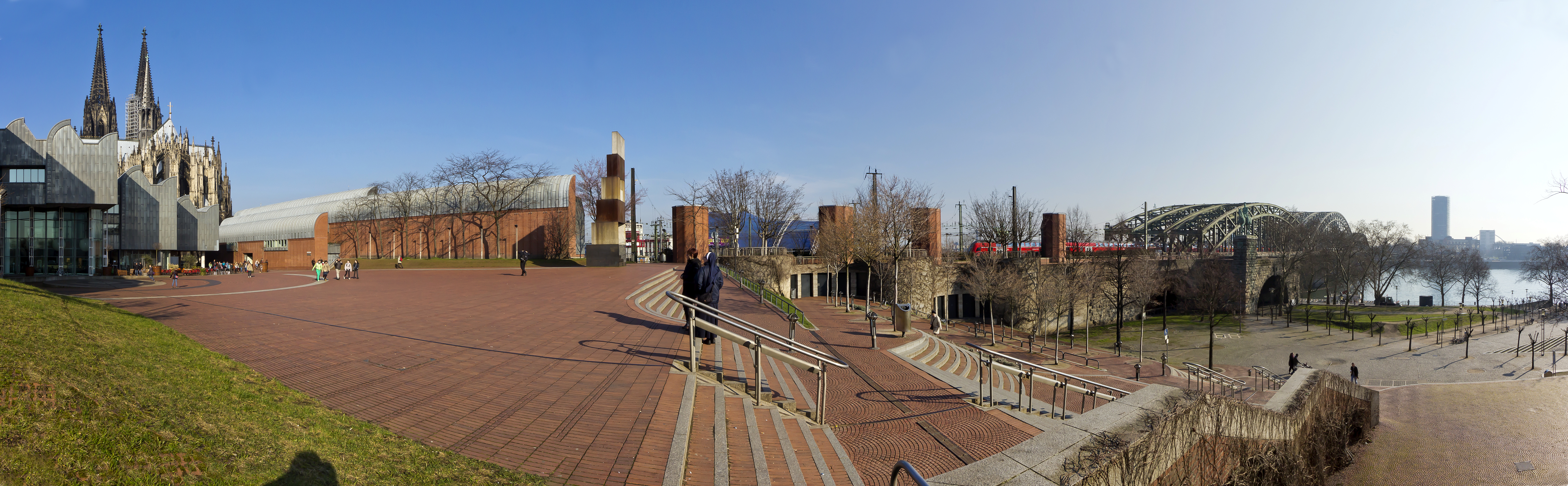 Heinrich-Böll-Platz in Köln. Die gesamte Platzanlage mit Treppen, Bäumen und Skulptur ist Dani Karavans Kunstwerk „Ma’alot. Links: Kölner Dom (Hintergrund), Museum Ludwig. Rechts: Hohenzollernbrücke.